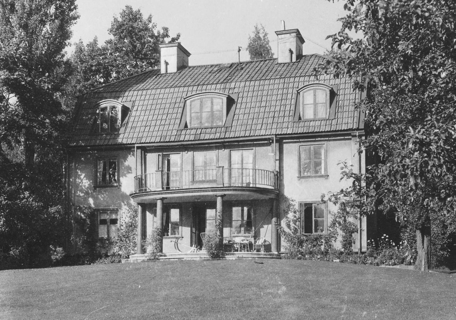 Alberget 4A, fasad mot syd